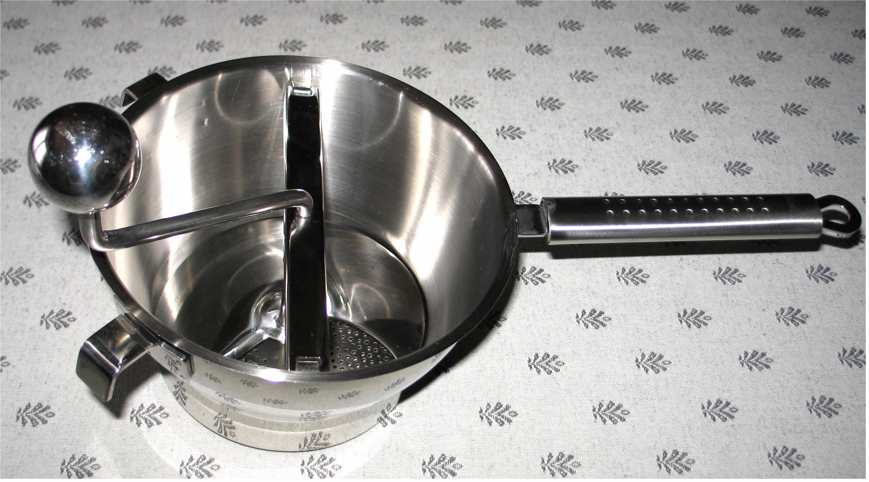 Eng Passe-Vite.